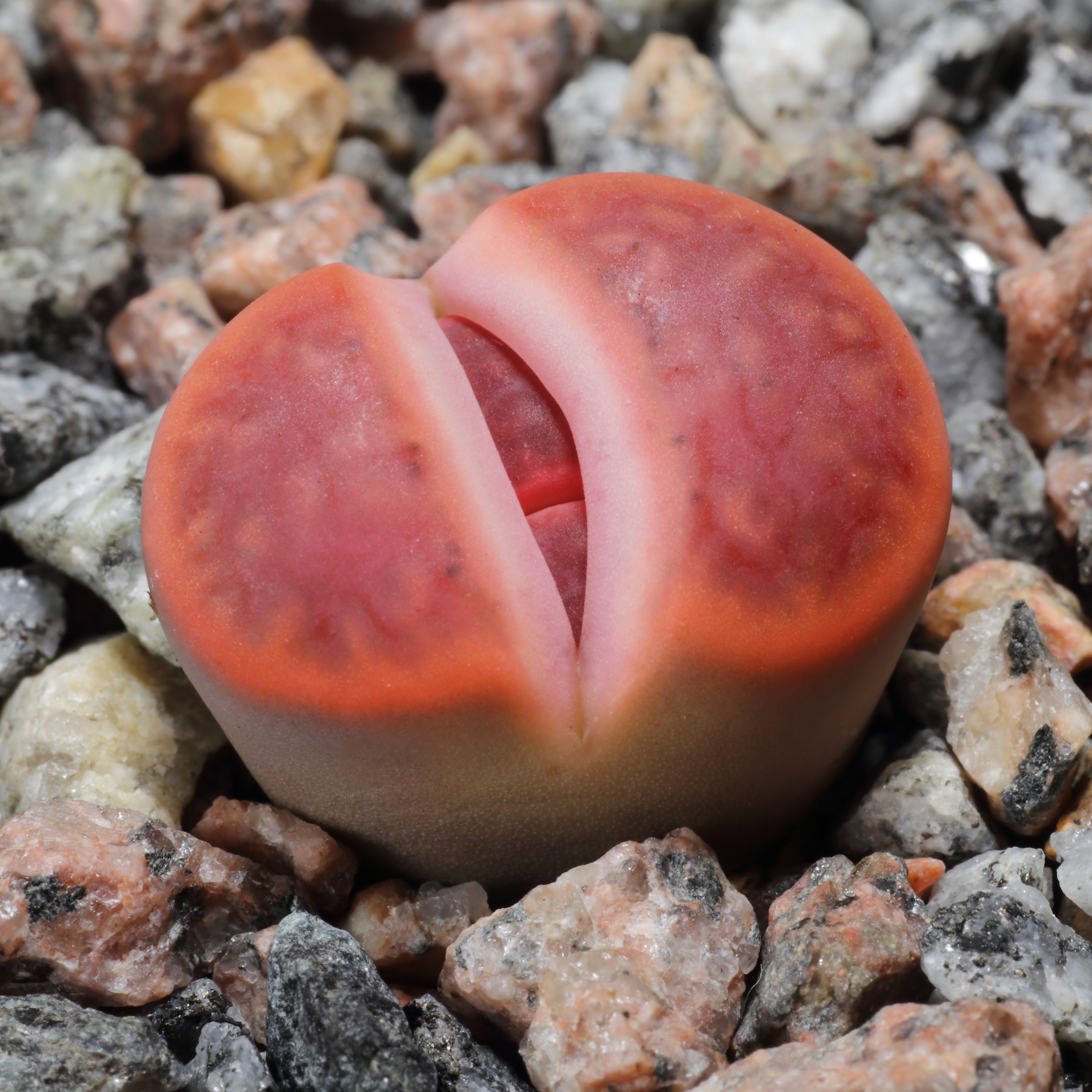 Lithops karasmontana v. lericheana C 330